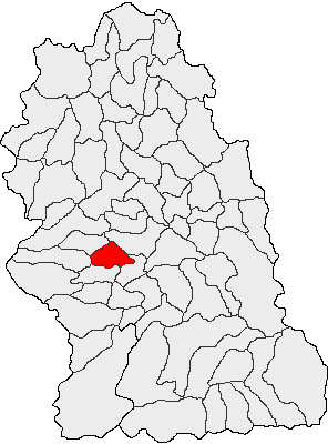 Categorie:Hărţi ale judeţului Hunedoara